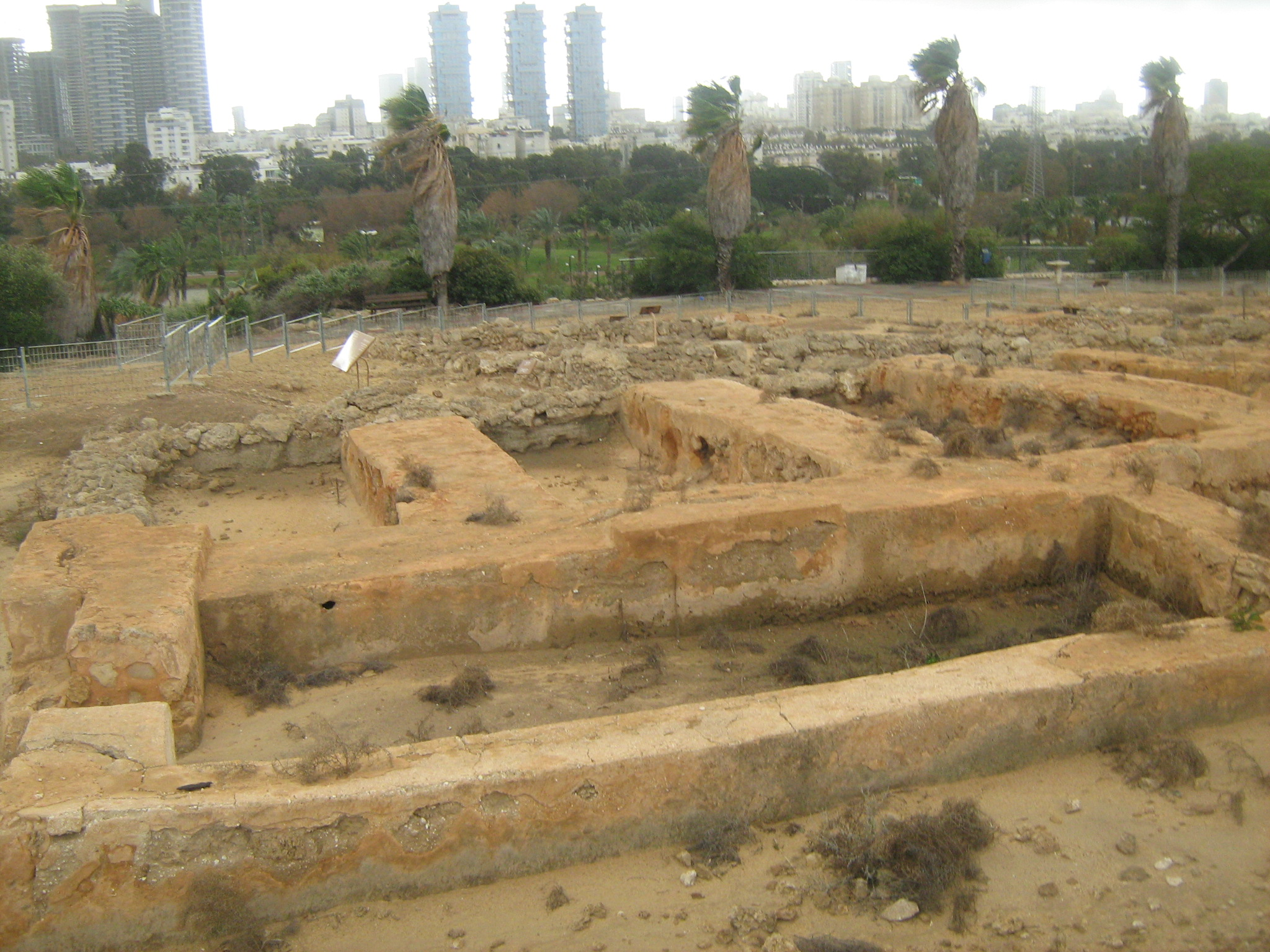 תל קסילה